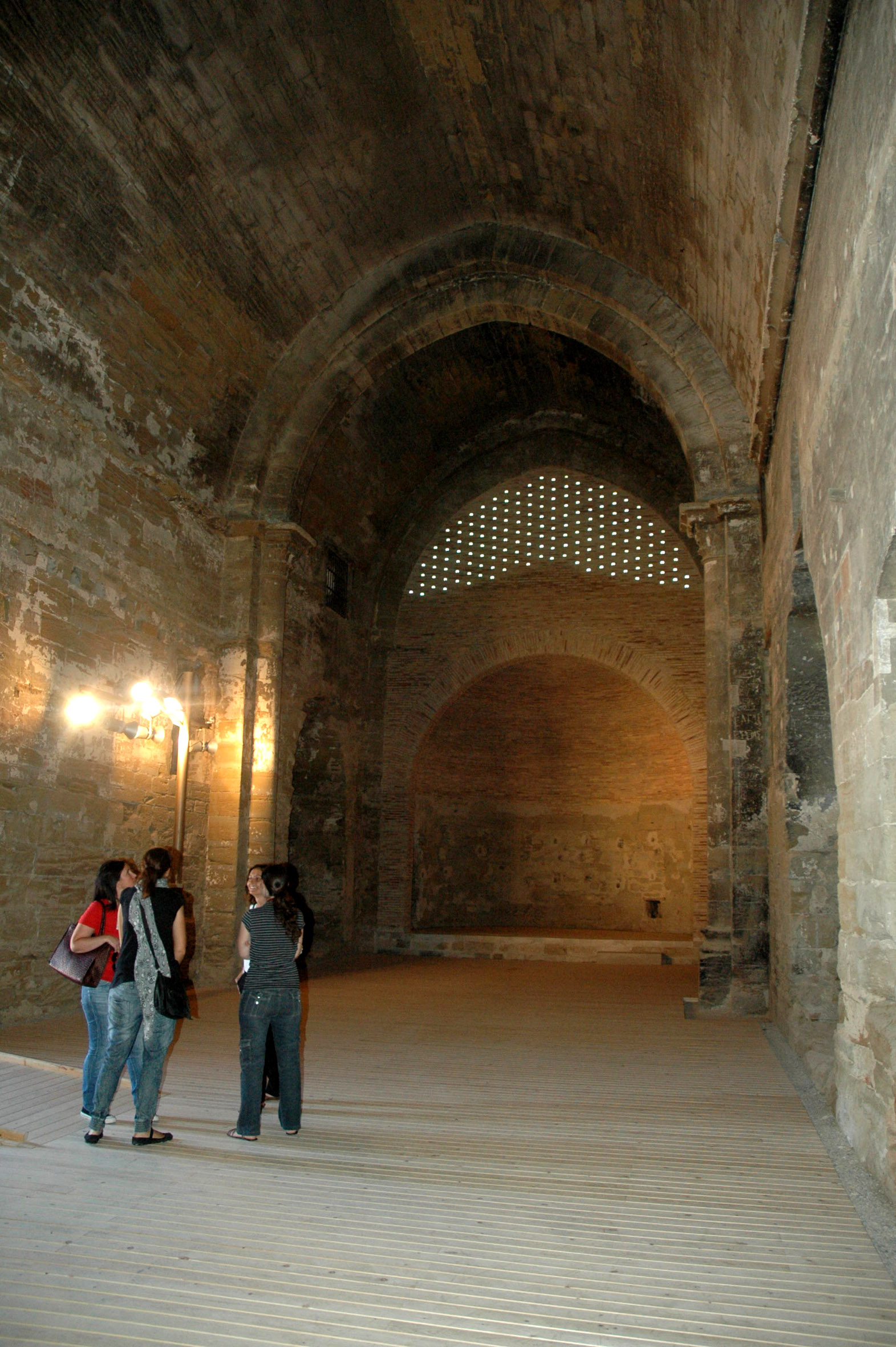 Castell templer de Gardeny, interior de la capella.